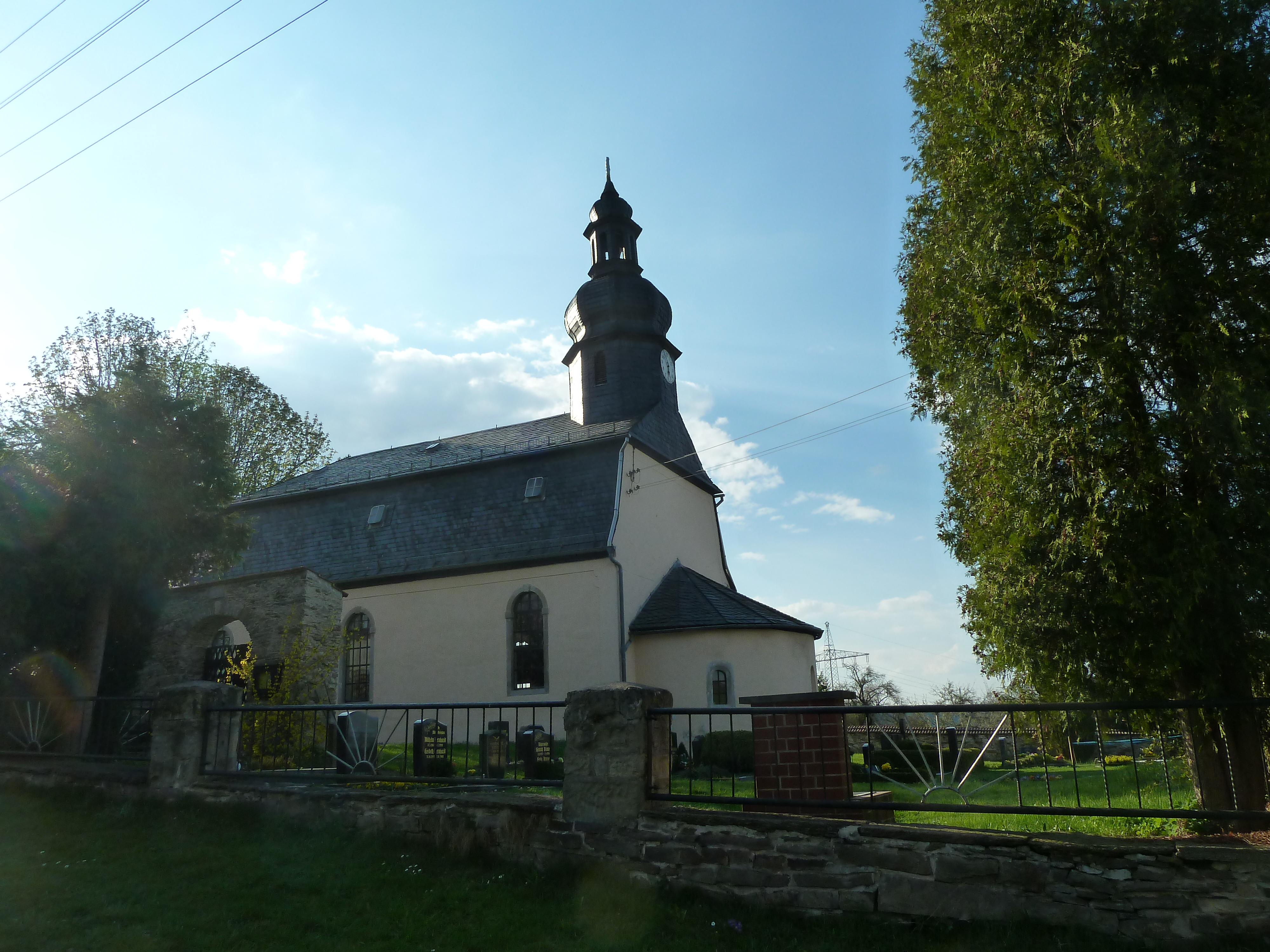 Kirche in Gräfendorf bei Krölpa